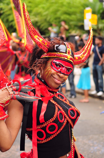 Czerwona diablica, uczestniczka parady na Notting Hill Carnival 2008